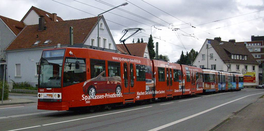 Tramwaj Adtranz M8D w bielefeldzkiej dzielnicy Brackwede na linii 1.